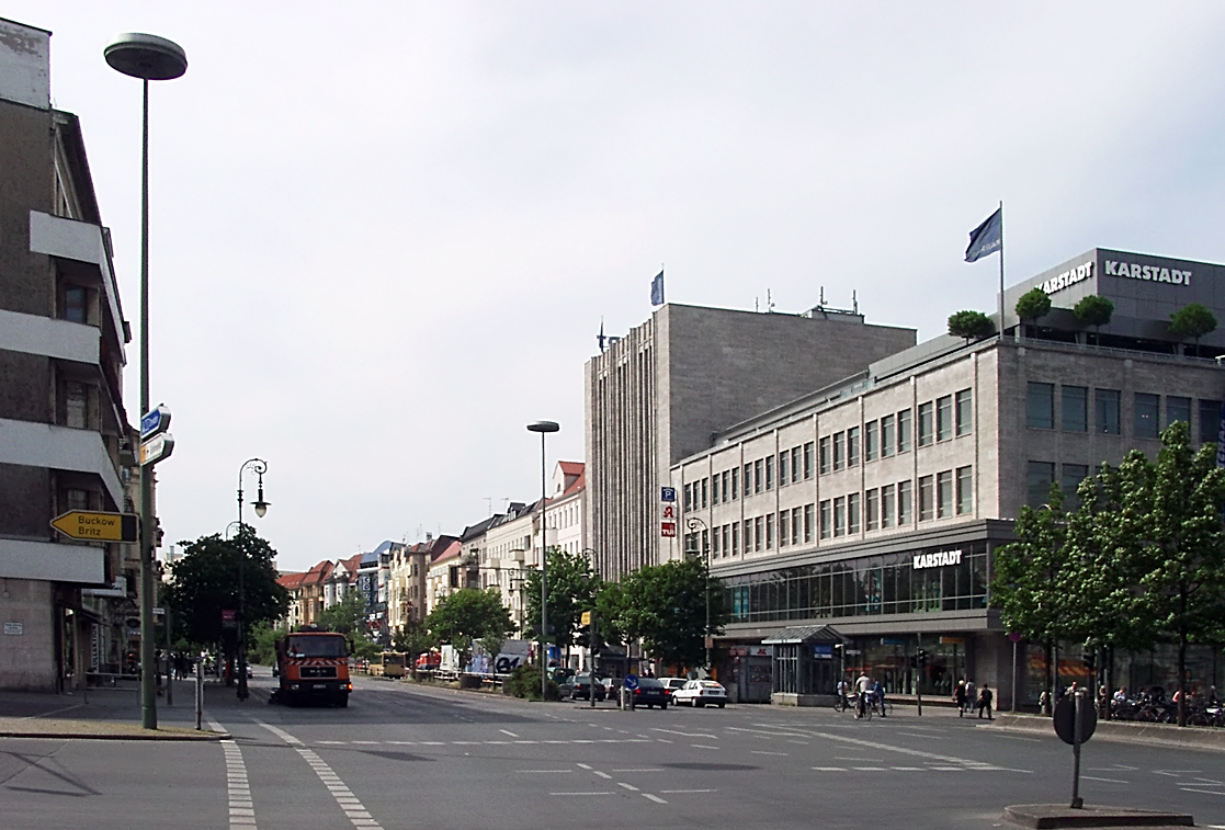 Hasenheide (Straße) in Berlin, Blick vom Hermannplatz in Richtung Südstern